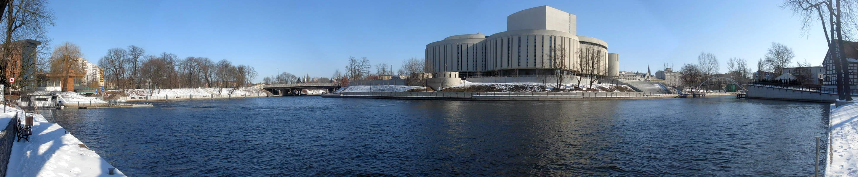 Panorama Brdy z Wyspy Młyńskiej w Bydgoszczy